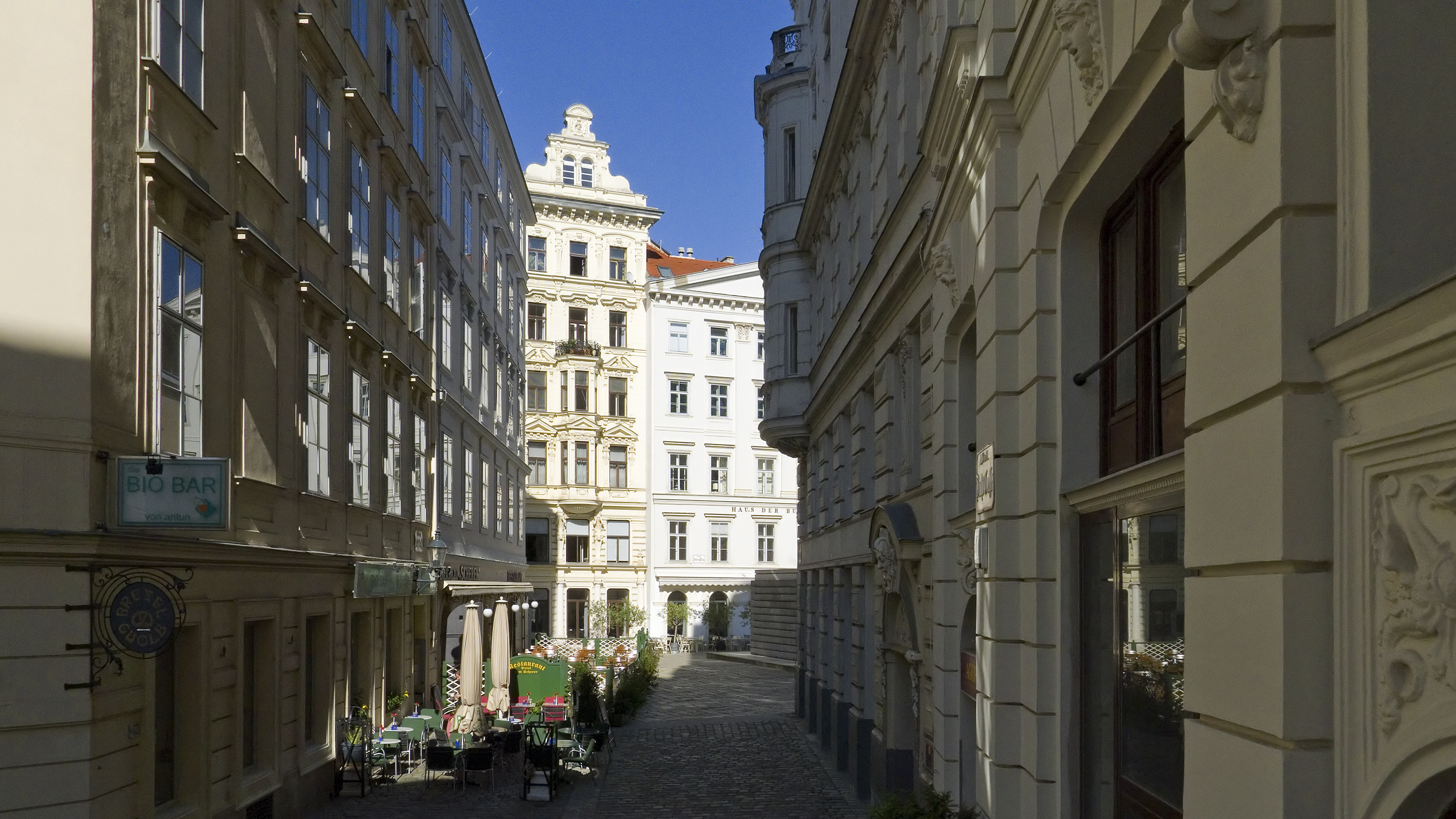 Drahtgasse in Wien 1 bei Nr. 3 Richtung Nordosten